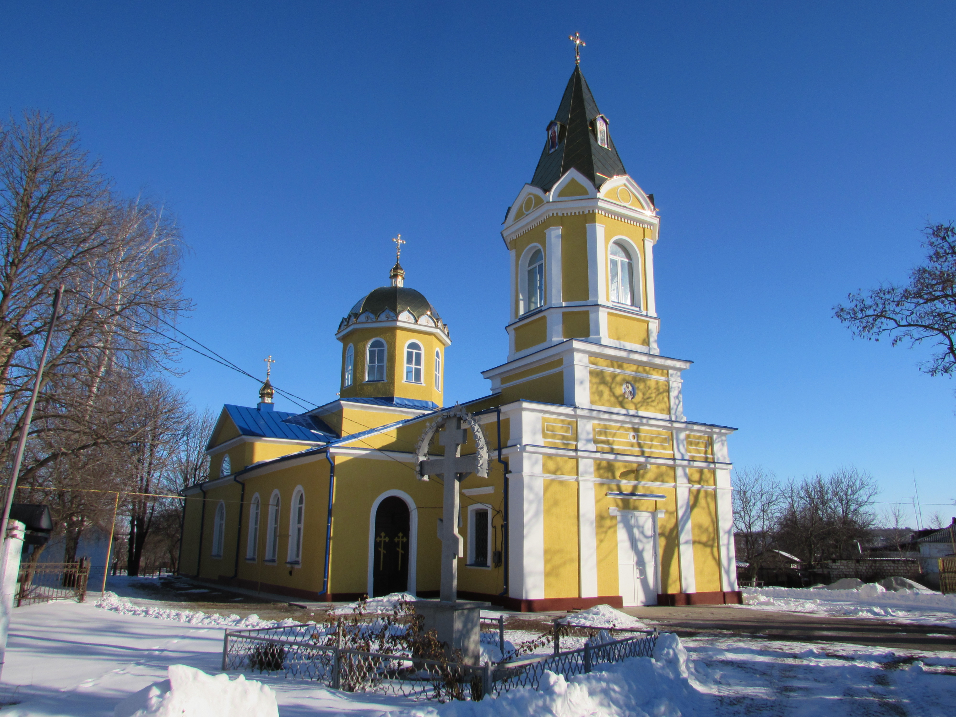 Миколаївська церква, Бобринець, вул. Леніна, 57